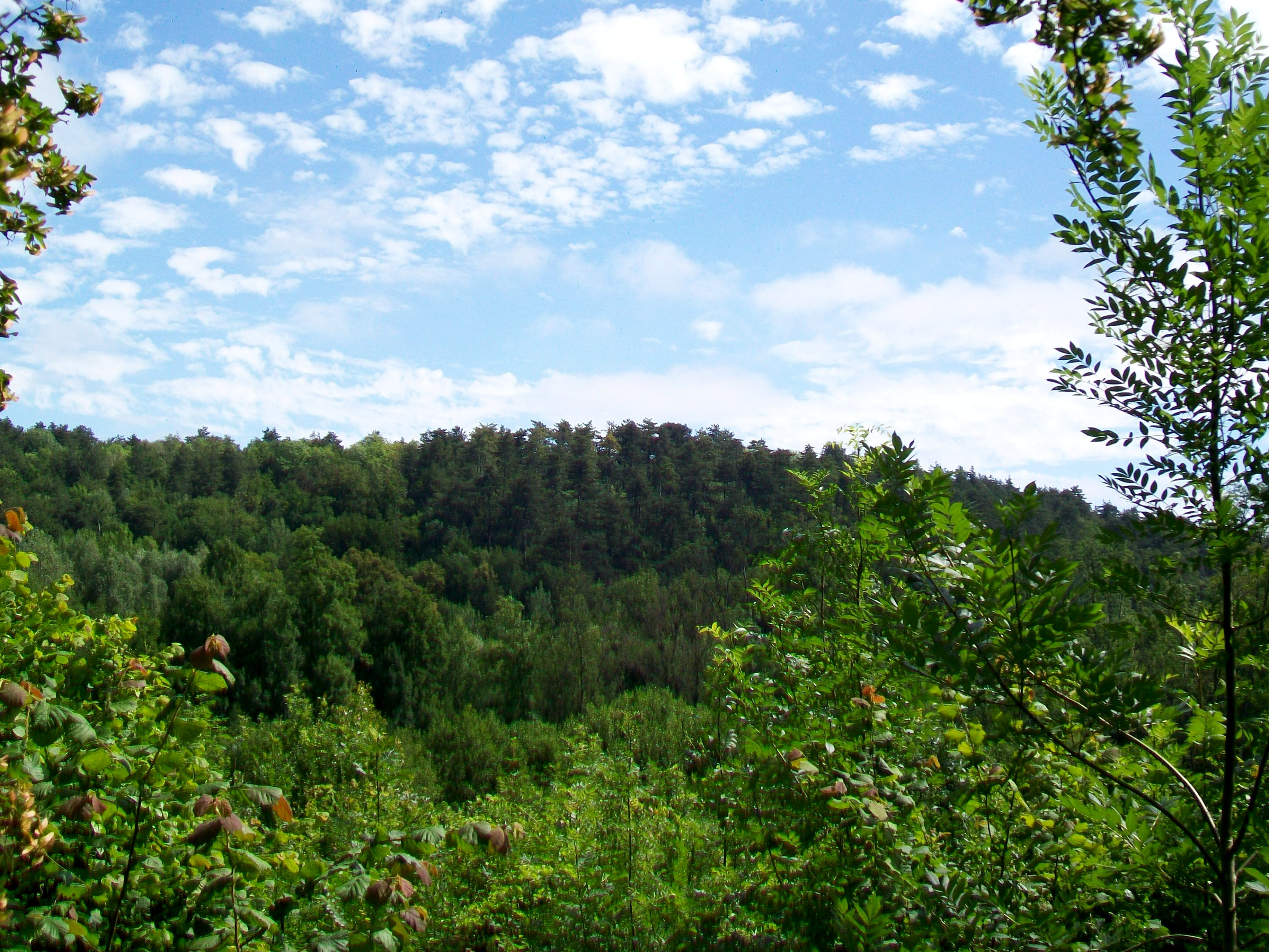 La forêt du Fond de Noël, vue depuis le chemin rural des Carrieuses à Noël-Saint-Martin.